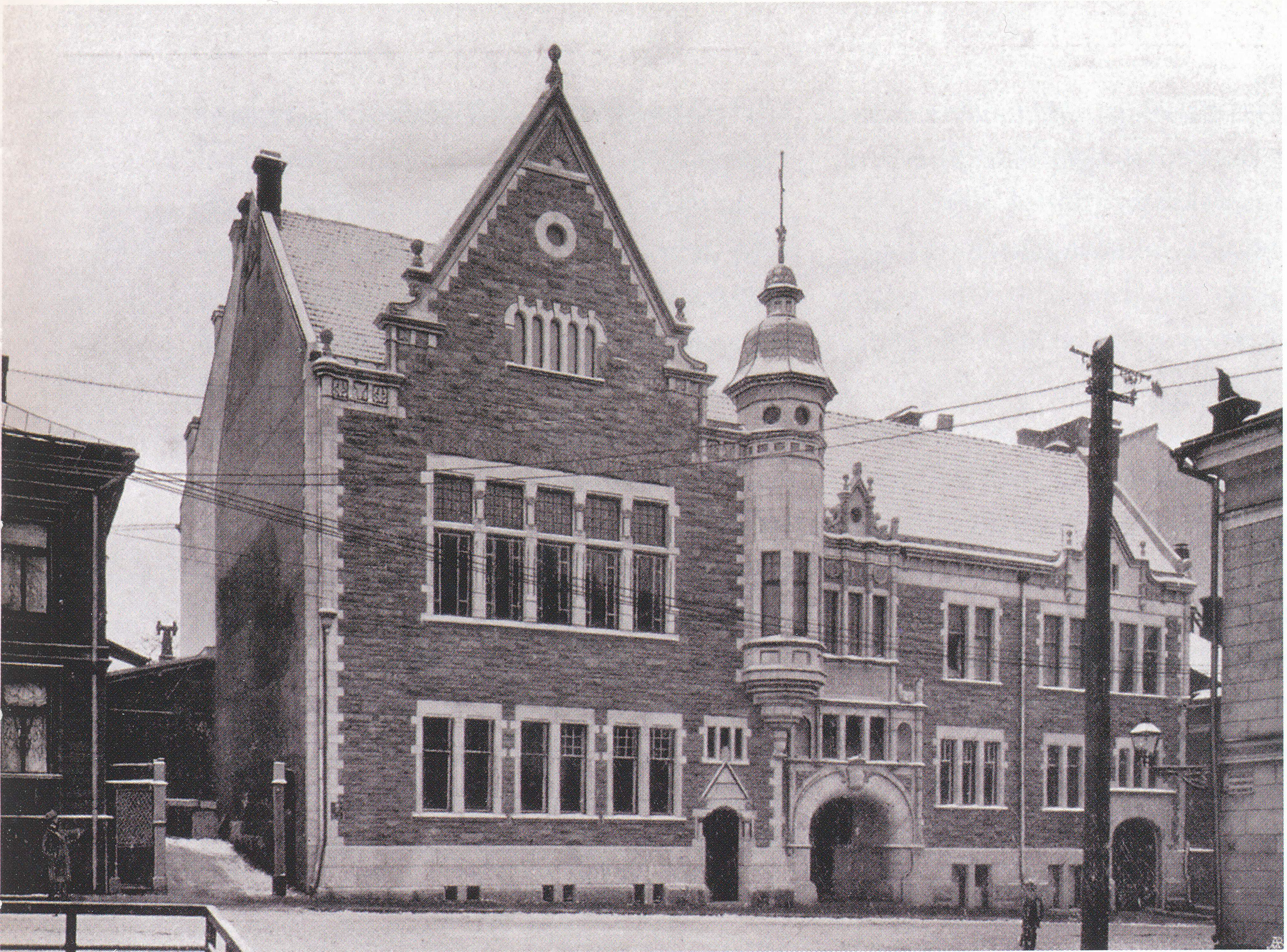 Karl Hård af Segerstadin suunnittelema Nylands Nationin osakuntatalo Helsingin Kasarmikadulla.